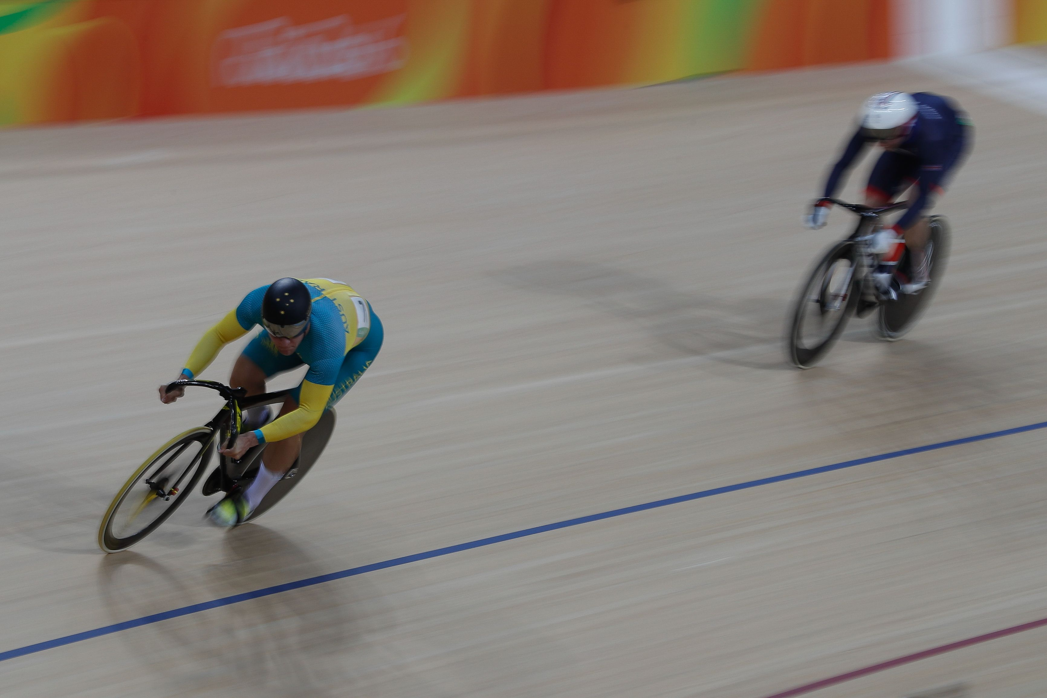 Fase final das competições de ciclismo no velódromo. Rio de Janeiro - O britânico Jason Kenny e o autraliano Patrick Constable nas quartas-de-final sprint de ciclismo no Velódromo dos Jogos Rio 2016, no Parque Olímpico.